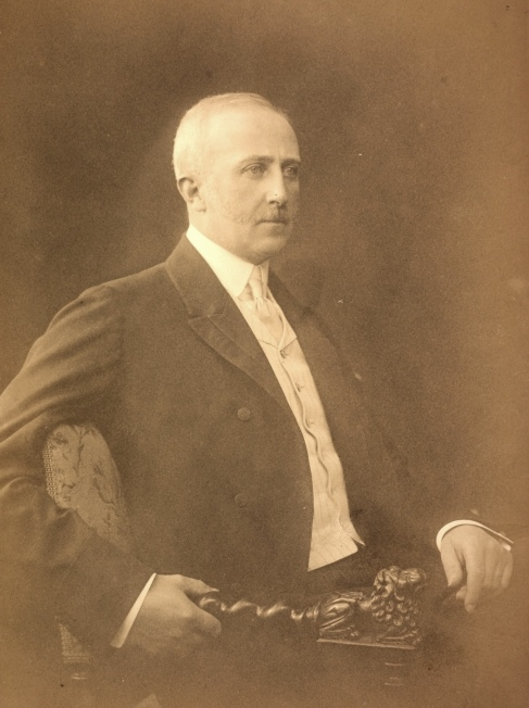 Heinrich Clam-Martinic (1863-1932) österr. Ministerpräsident